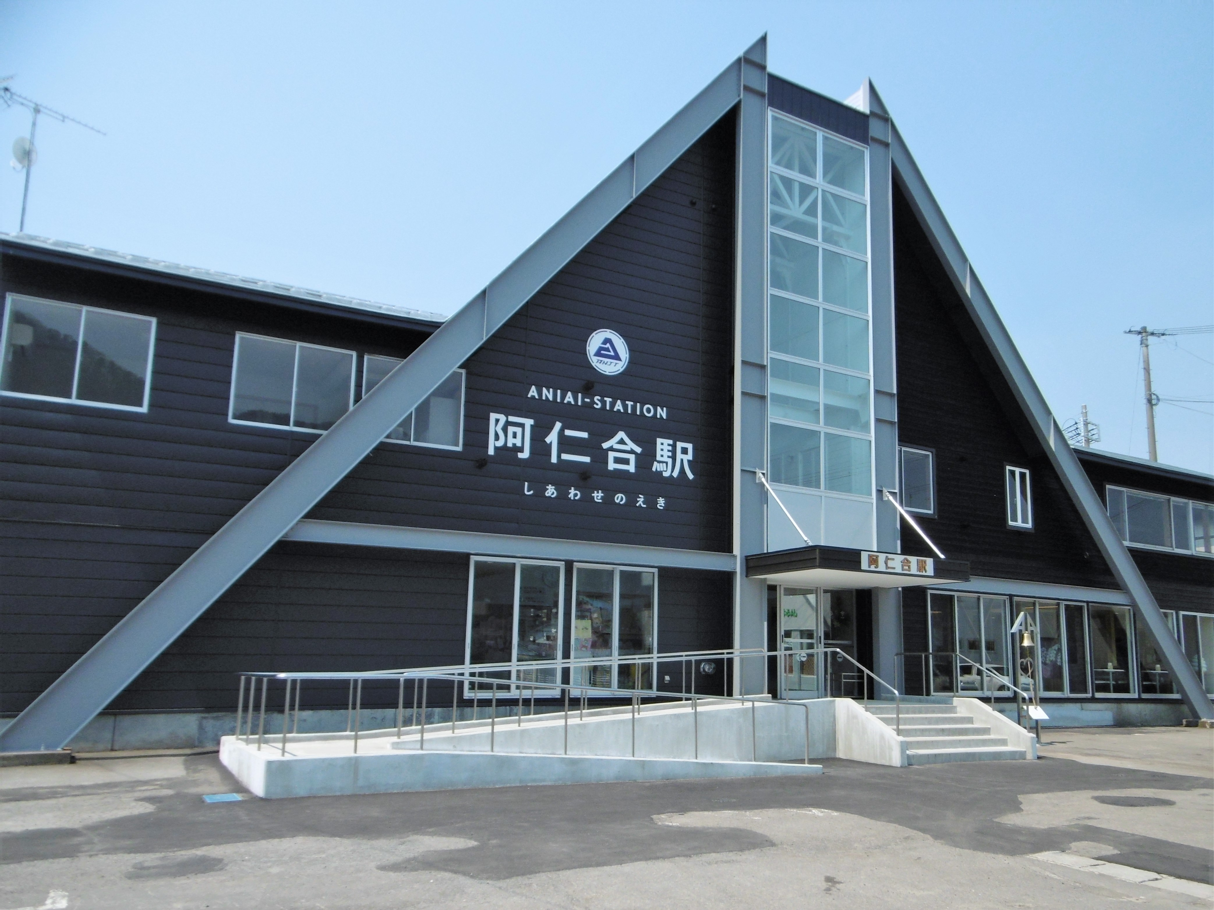 阿仁合駅舎-2018年4月